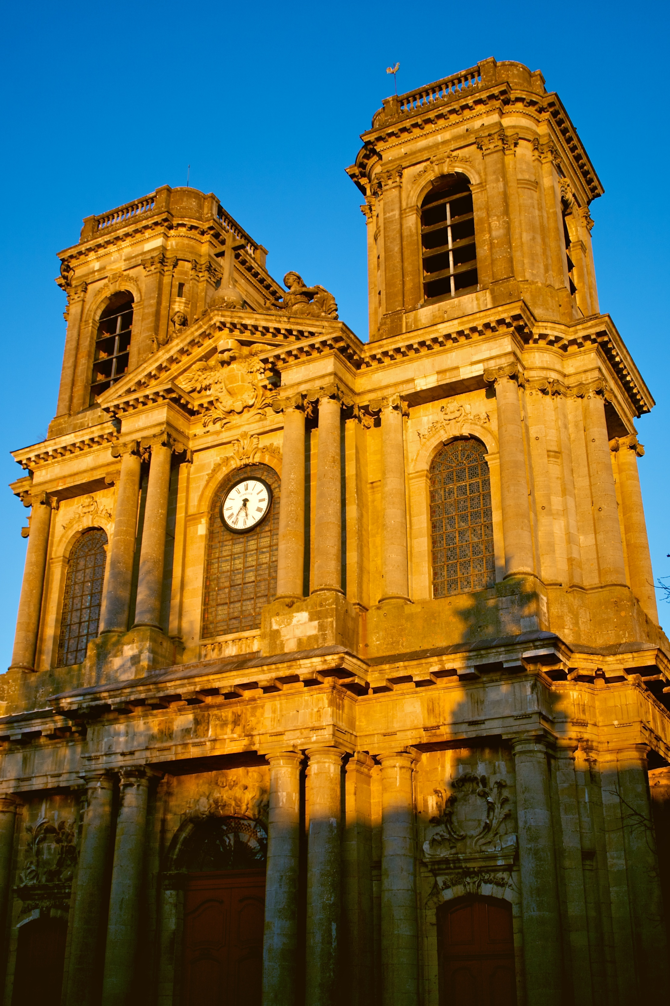 Cathédrale Saint Mammès, Langres